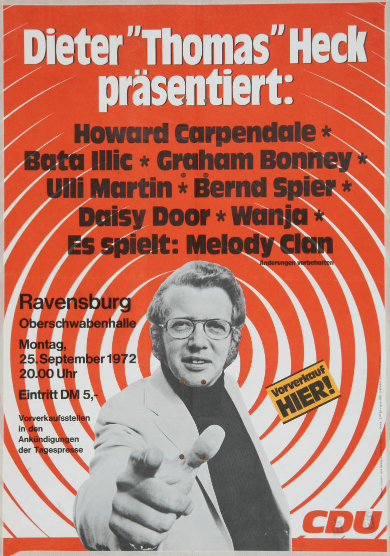 Dieter "Thomas" Heck präsentiert: Howard Carpendale, Bata Illic, Graham Bonney, Ulli Martin, Bernd Spier, Daisy Door, Wanja Es spielt: Melody Clan ... Abbildung:PorträtfotoPlakatart:AnkündigungsplakatAuftraggeber:Konzert- und Gastspieldirektion Artur HerzDrucker_Druckart_Druckort:G.W. Bösemann oHG, Grafischer Großbetrieb, KleveObjekt-Signatur:10-001: 1696Bestand:Plakate zu Bundestagswahlen (10-001)GliederungBestand10-18:Plakate zu Bundestagswahlen (10-001) » Die 7. Bundestagswahl am 19. November 1972 » CDU » AnkündigungsplakateLizenz:KAS/ACDP 10-001: 1696 CC-BY-SA 3.0 DE